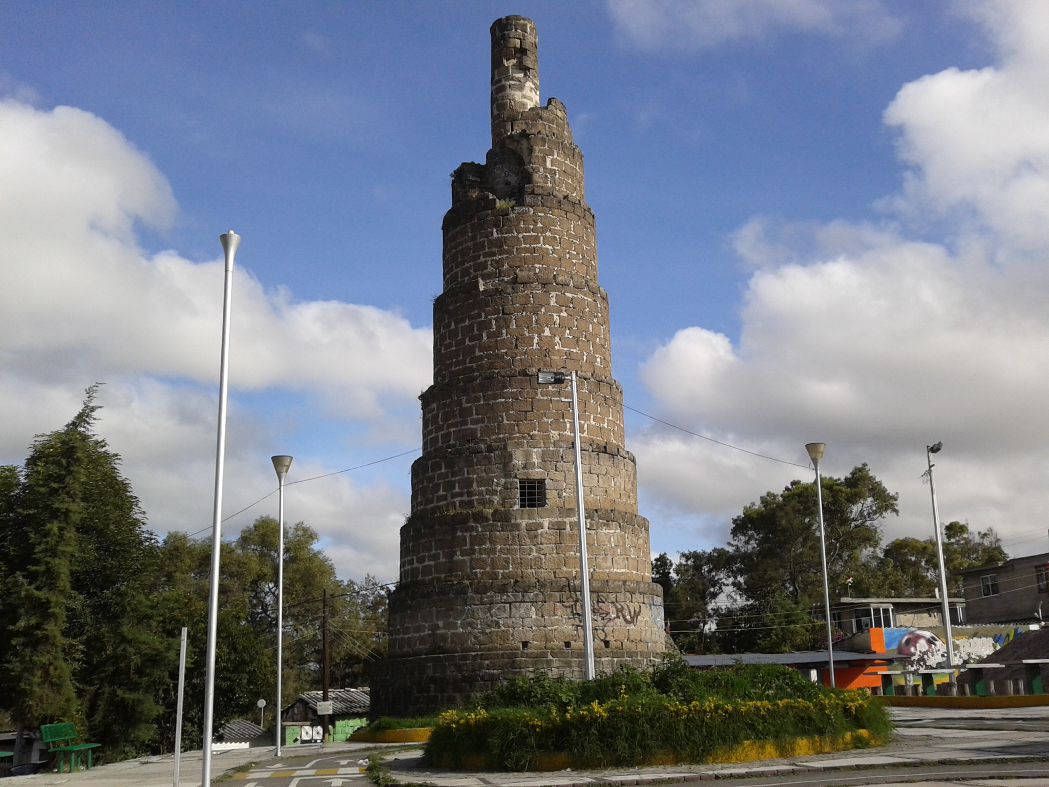 Caracol Oriente del acueducto de los Remedios ubicado en Naucalpan de Juarez Estado de México